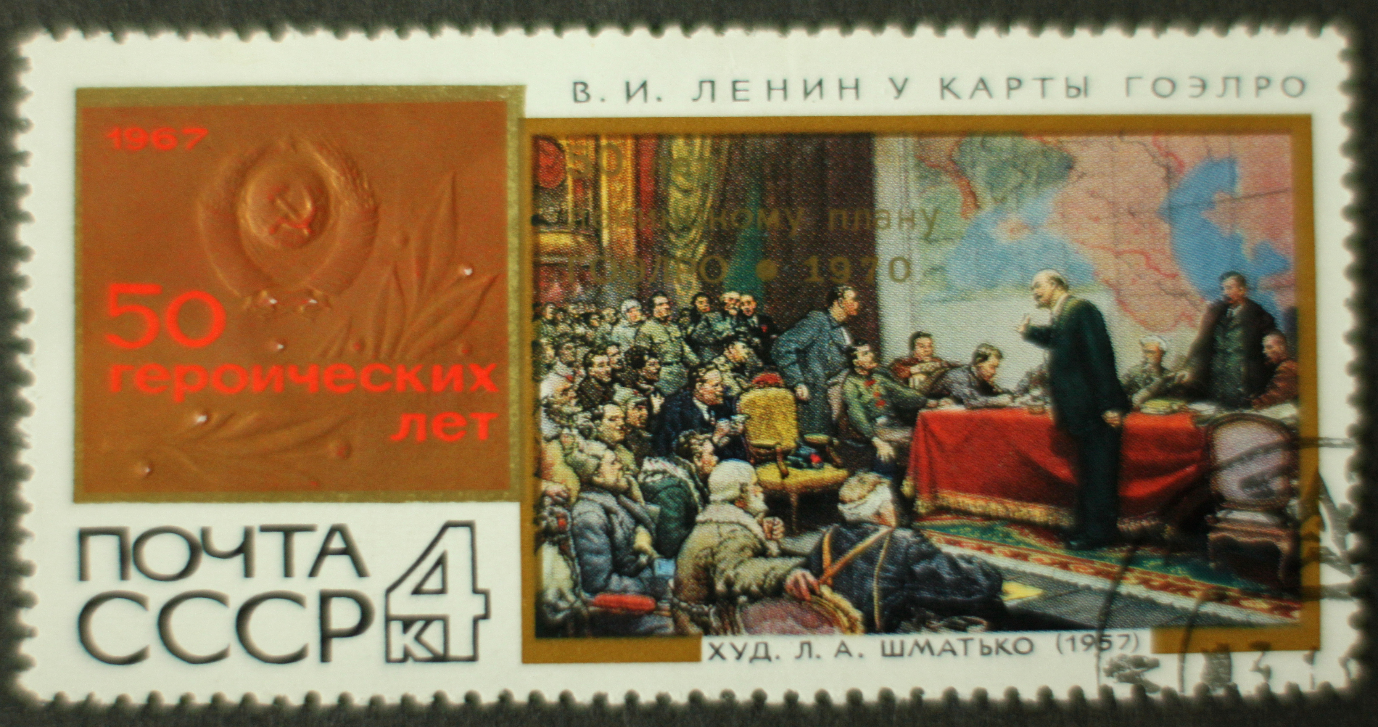 Briefmarke, Sowjetunion, 1967